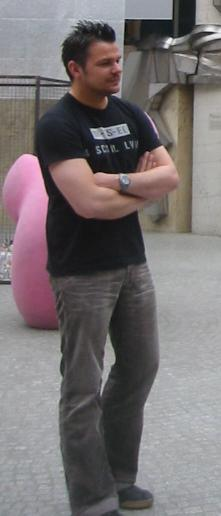 DJ ATB in Łódź